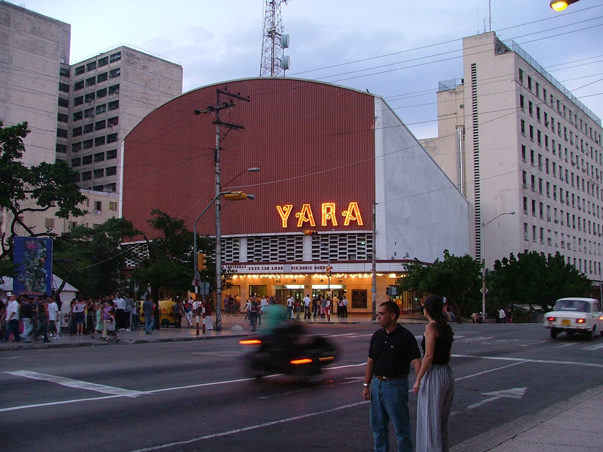 Le cinéma Yara à l'angle des rues 23 et L à La Havane, Cuba.